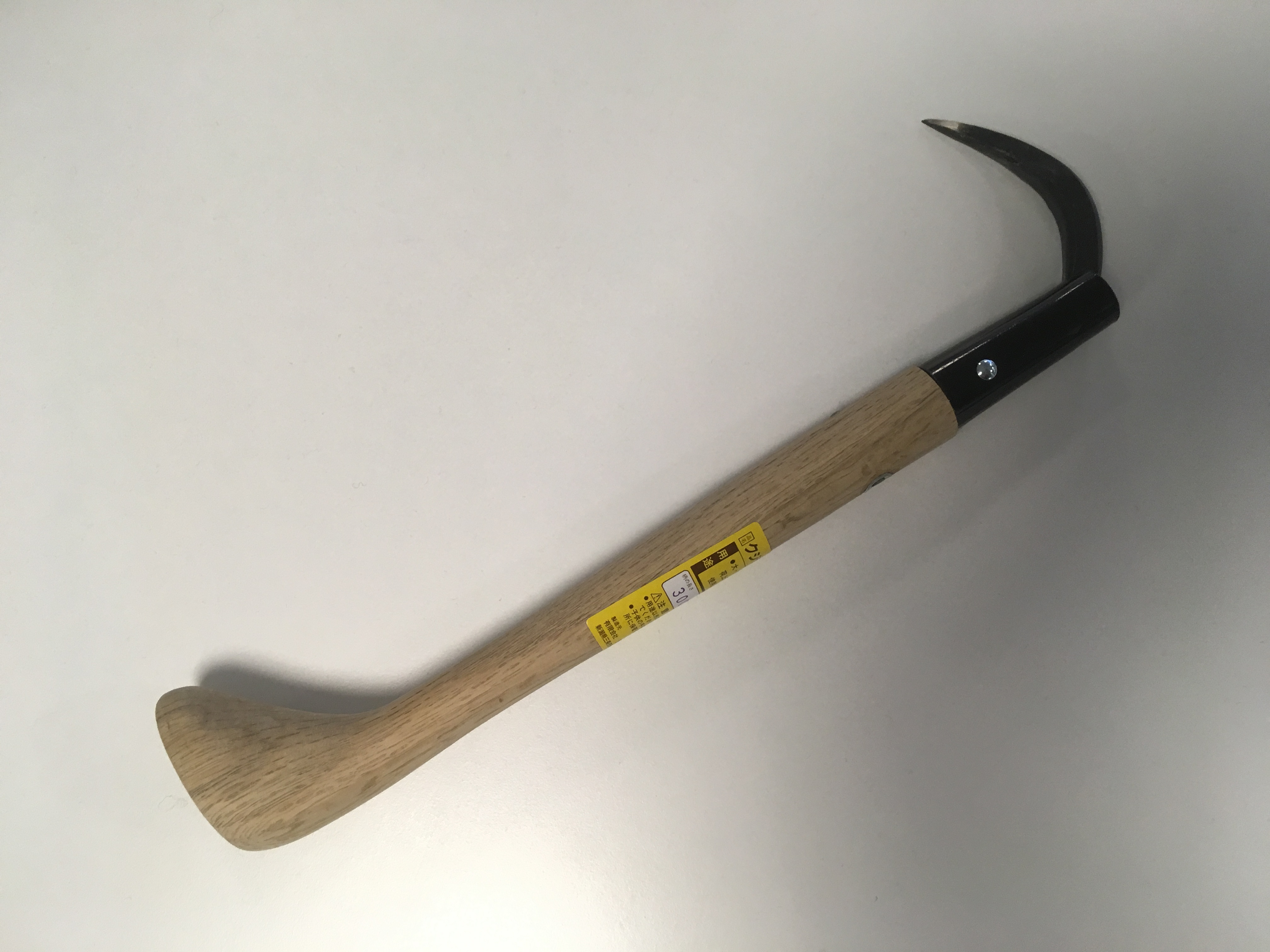 Dans le cadre de la pêche, le tegaki est un outil qui permet de décérébrer les poissons afin de les tuer avec le moins de douleur possible (pratique nommée ikejime). L'objet représenté mesure 32 cm x par 9 cm Acier et bois.